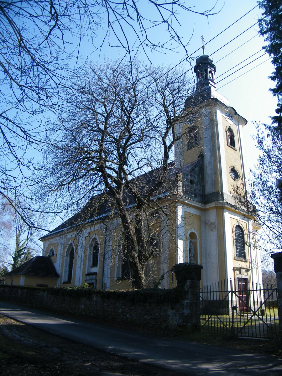 Kostel Nanebevzetí Panny Marie v Doubici